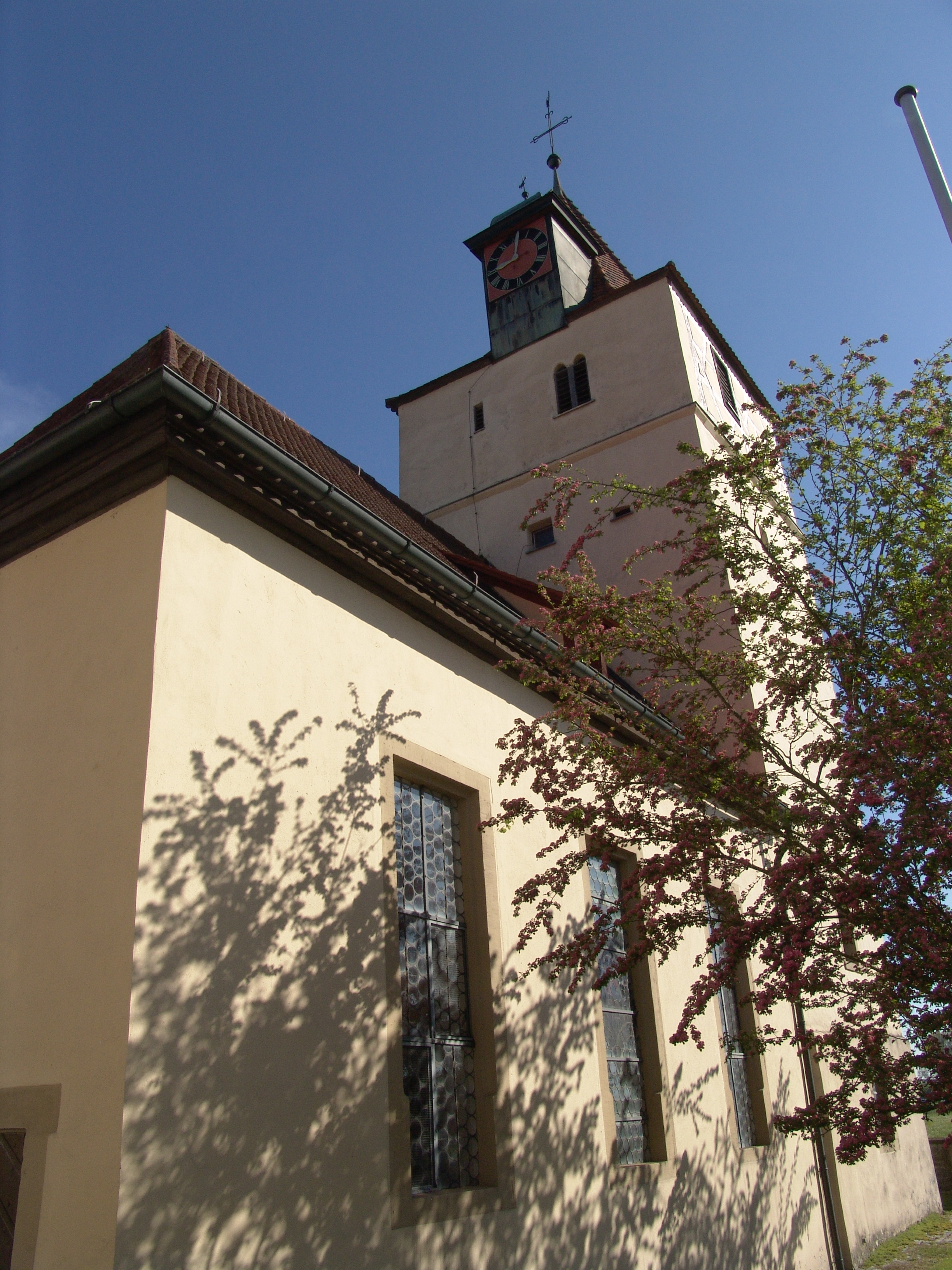 evang.-luth. Kirche in Habelsee